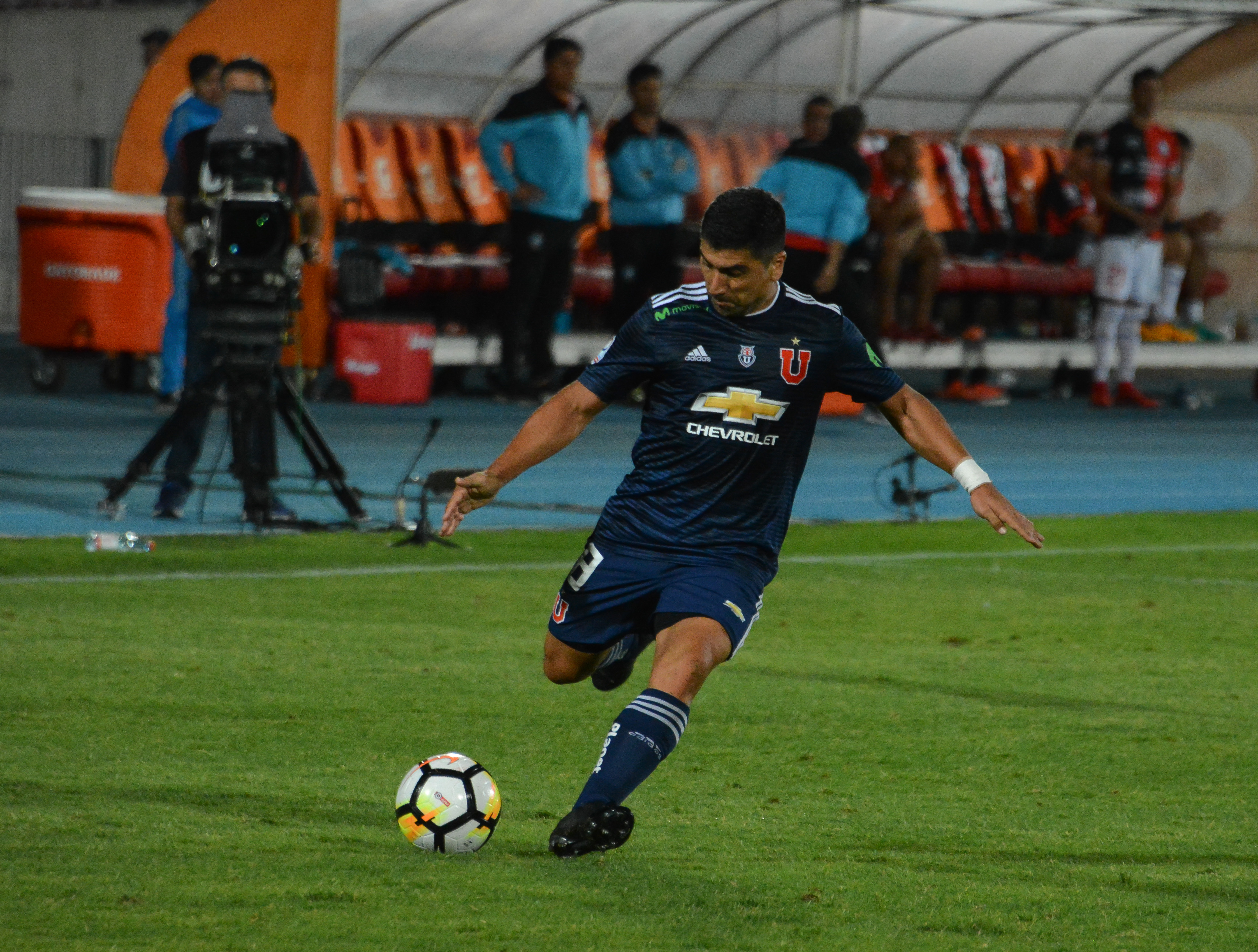 David Pizarro, Universidad de Chile v Deportes Antofagasta, Estadio Nacional, Santiago, Chile.